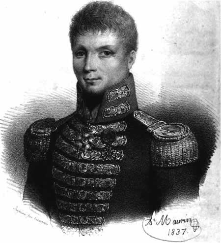 imagen del capitan de navio francés Jean Jacques Etienne Lucas